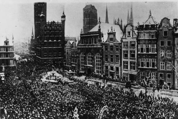 Manifestación en Danzig a favor de su devolución a Alemania, 1933.